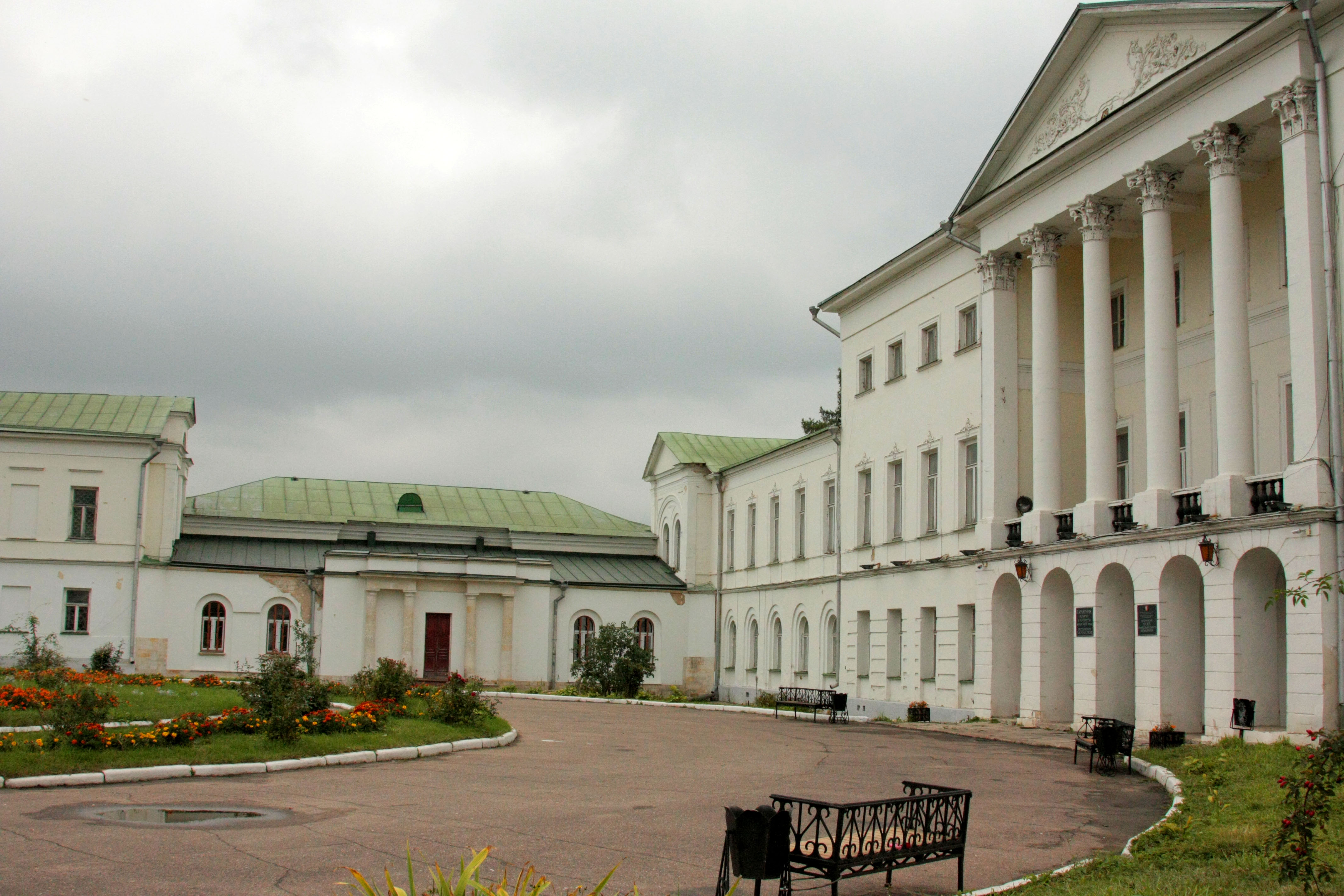 Курдонёр усадьбы Ивановское